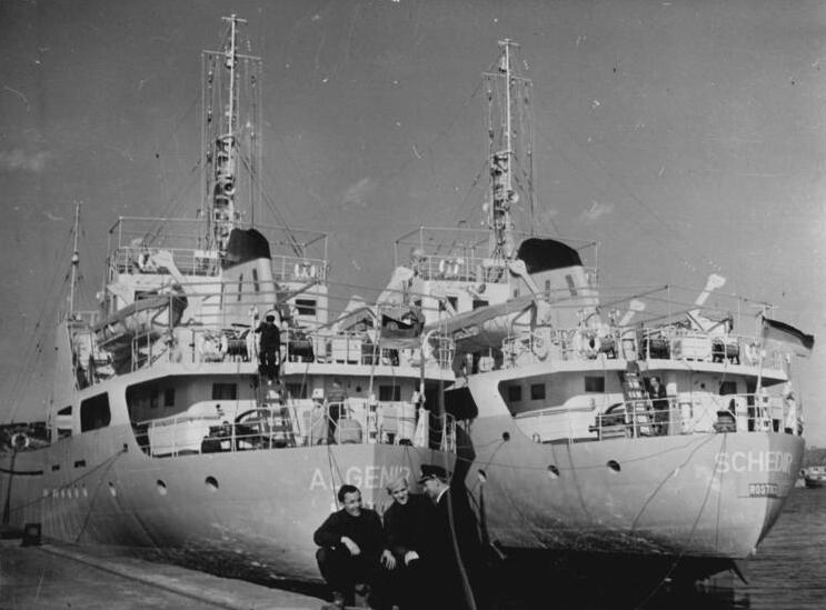 Zentralbild-Pommerening-26.4.1960 We-Fr. AV 3195 26.4.1960. Küstenmotorschiffe für Vietnam. Die ersten beiden auf der Wolgaster Peene-Werft für die Demokratische Republik Vietnam gebauten Küsten-Motorschiffe gingen am 26.4.1960 von Warnemünde aus mit Kurs auf Haiphong in See. Die 840 Tonnen großen Schiffe benötigen für die rund 10 000 Seemeilen lange Route etwa 60 Tage und müssen 6 ausländische Häfen zur Übernahme von Treibstoff anlaufen. UBz: die beiden für Vietnam bestimmten Schiffe vor der Abreise im Warnemünder Hafen- Gesprächsgruppe v.r.n.l.: Der Kapitän der "Algenib" Breesemann sowie die Matrosen Hartmut Fischer und Dieter Schönfelder."